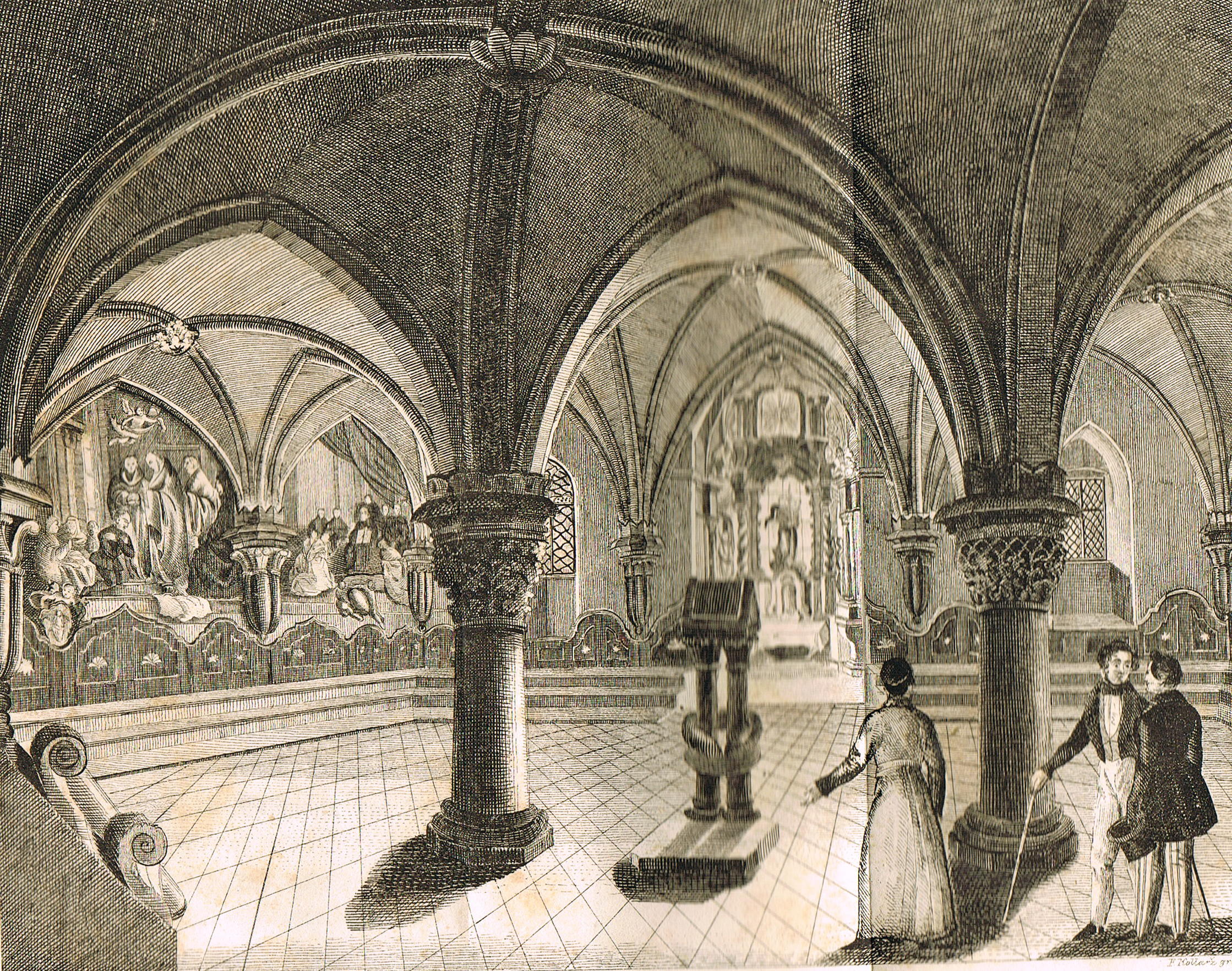 Aus dem Buch von H.J. Urbani, Das Cisterzienserstift Ossegg mit seinen Umgebungen (Leitmeritz und Teplitz 1839).